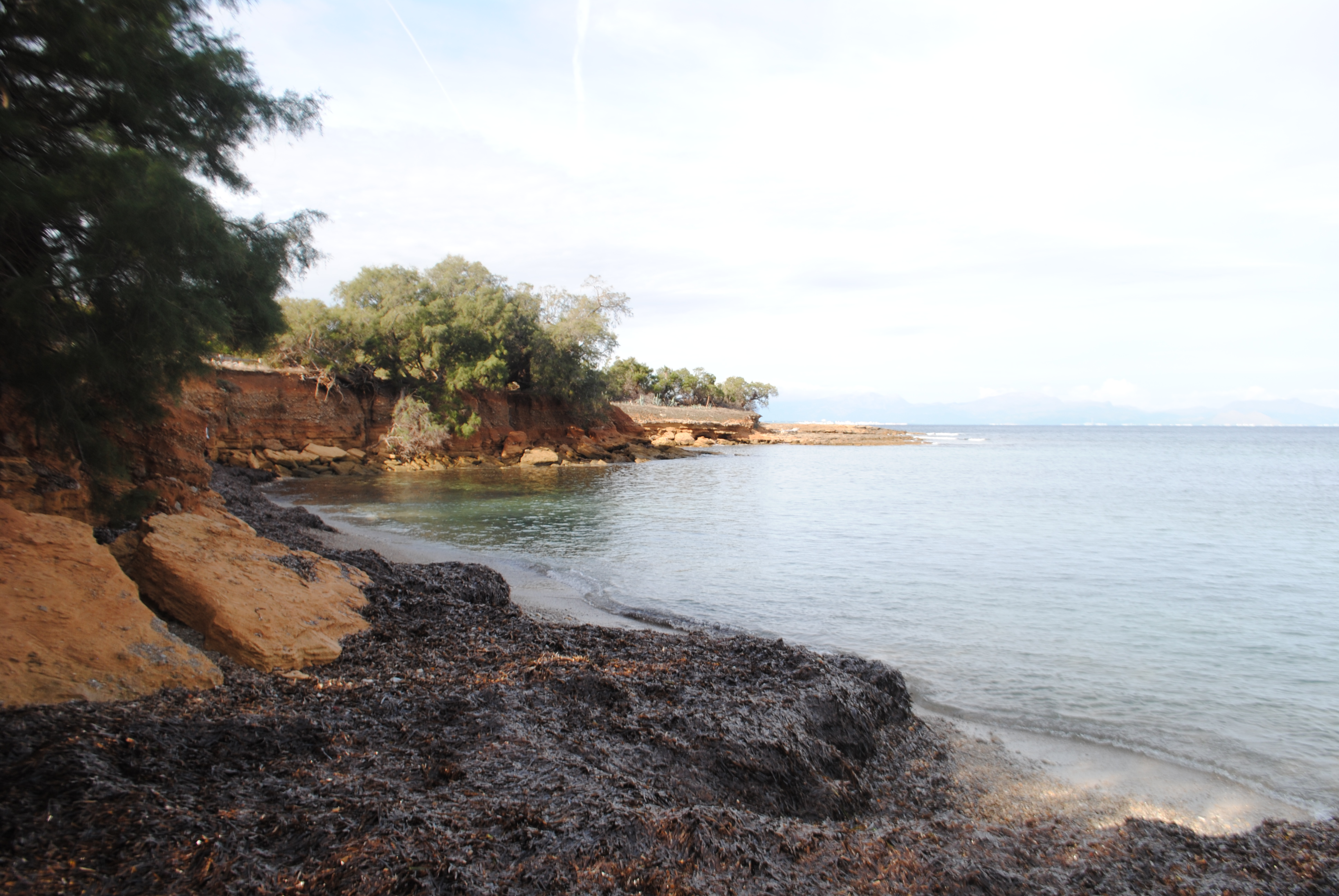 Caloscamps